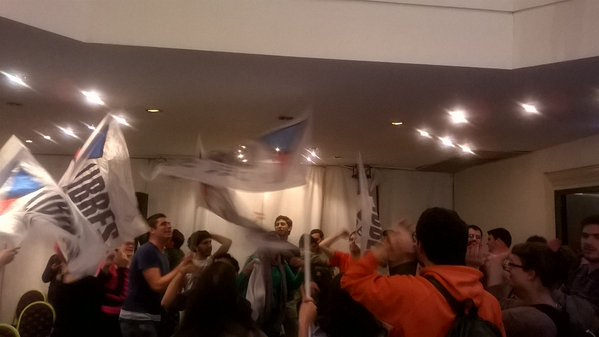 22.30 Festejeros Libres del Sur